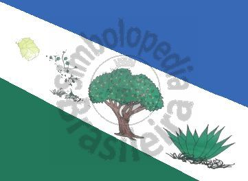 Bandeira do município de Juazeirinho na Paraiba